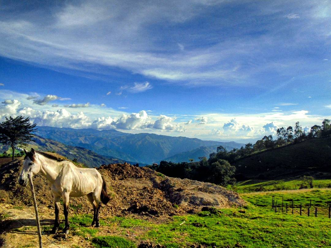 Al fondo se aprecia el norte de Caldas.